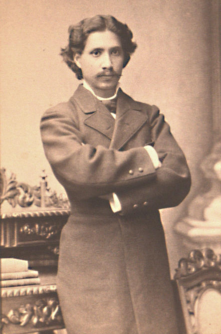 Gama Pinto, Claudio Julio Raymundo da